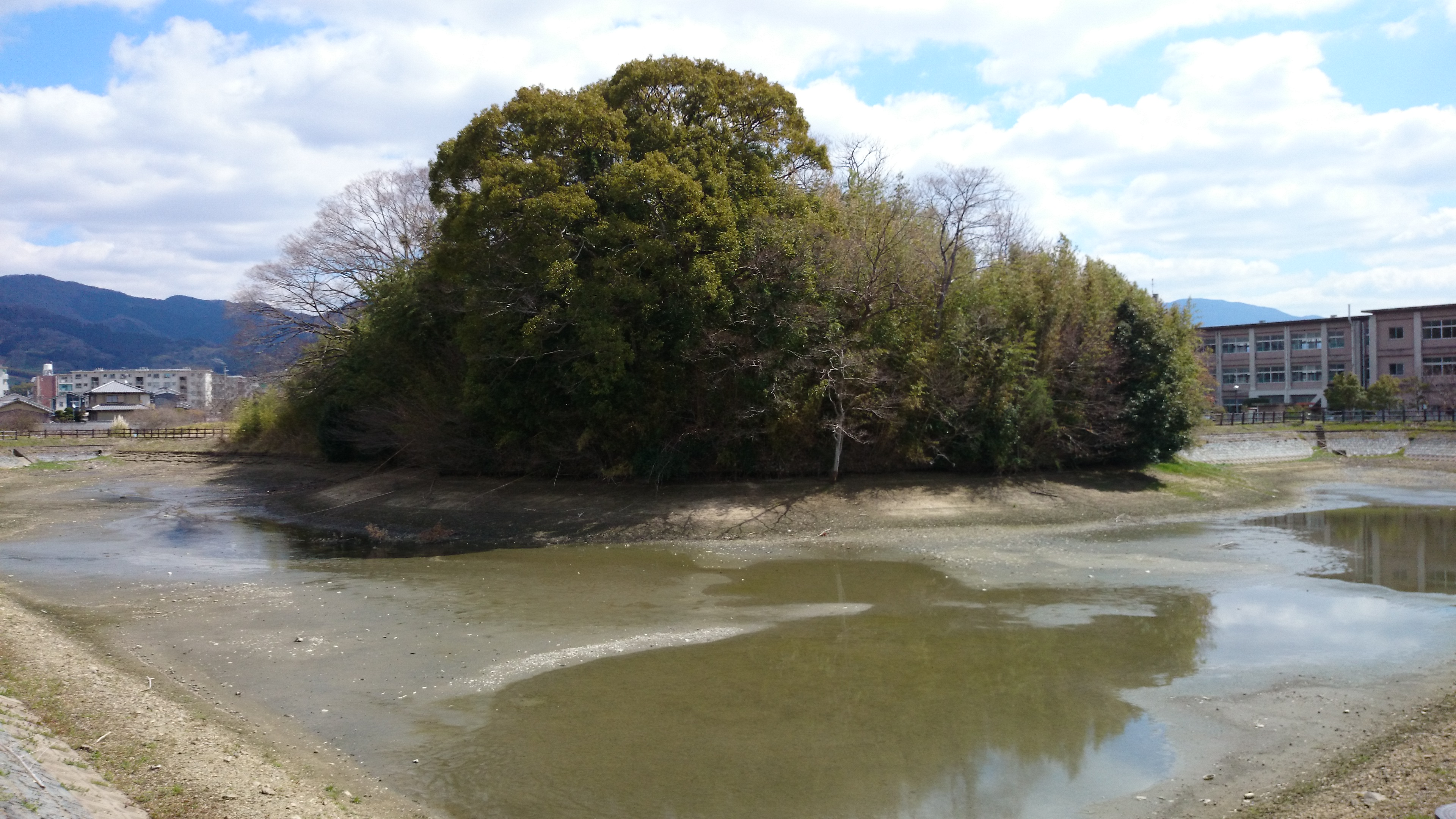 纏向古墳群の勝山古墳です。